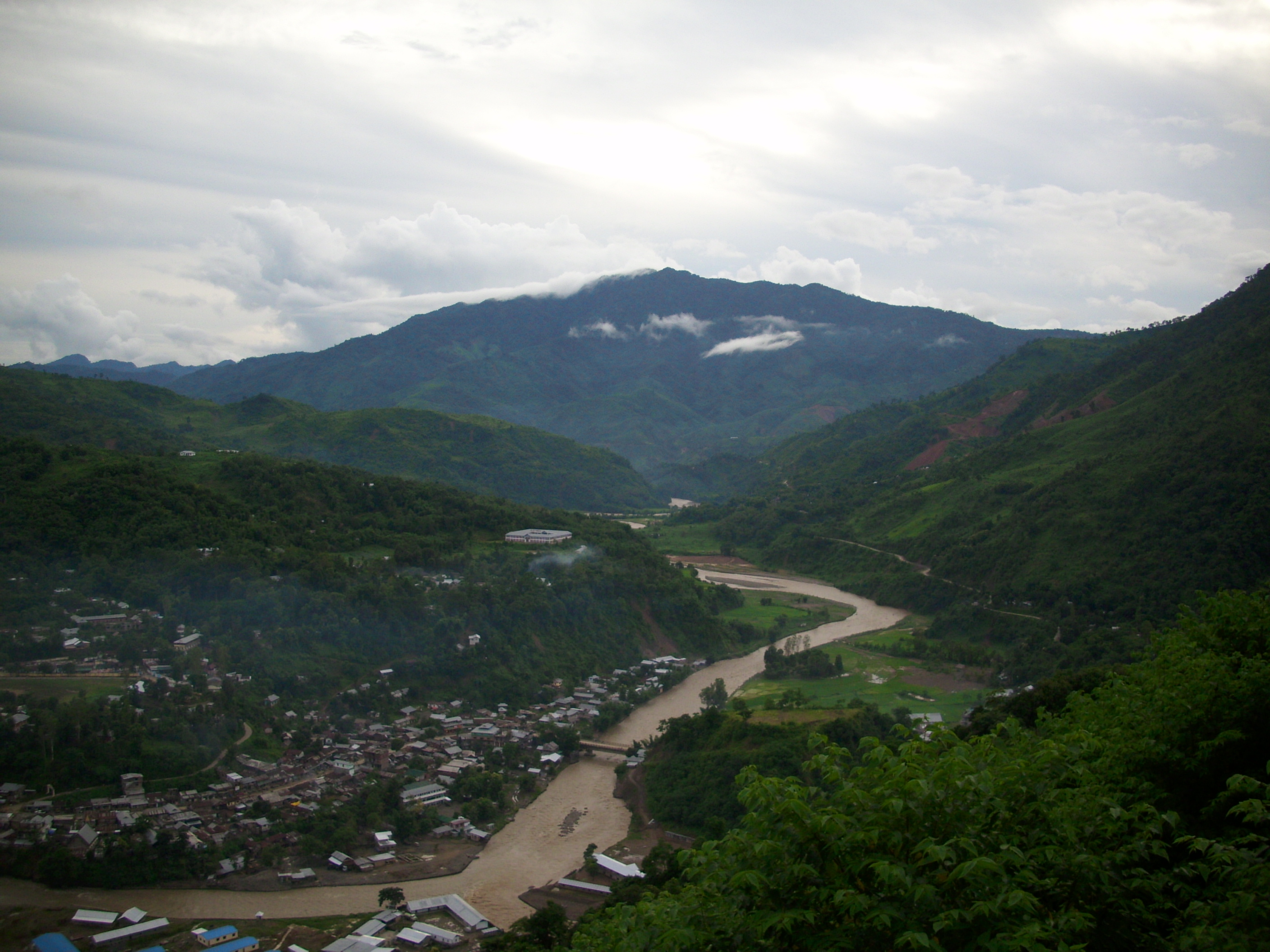 Noney Market